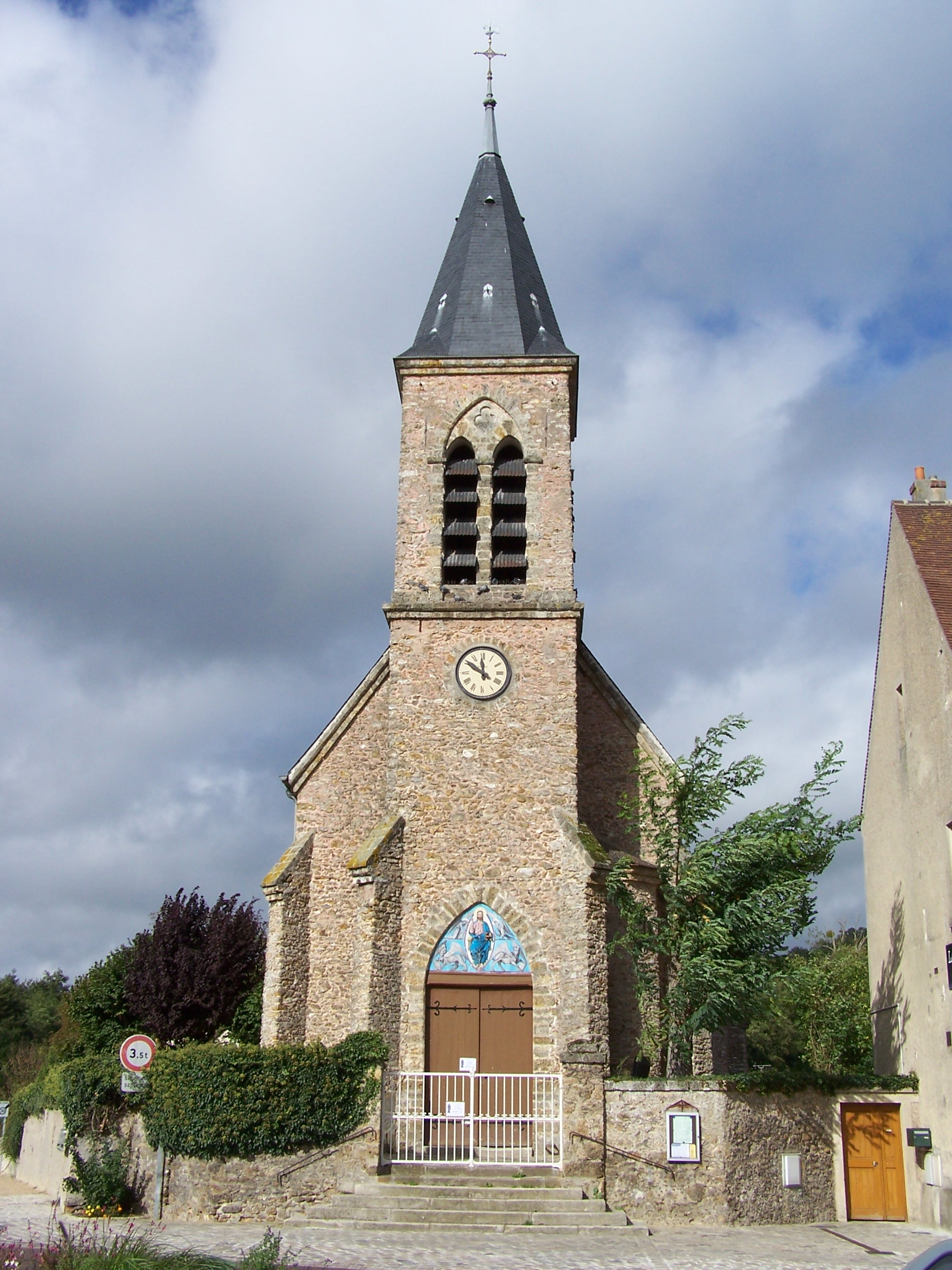 Église d'Auffargis (Yvelines, France)